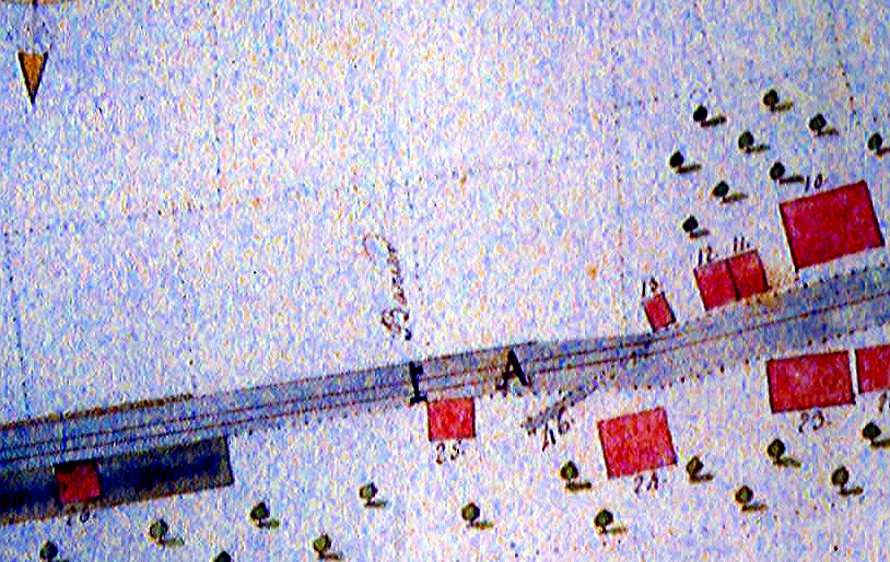 Ausschnitt aus der Chart der durch das Dorf Wermelskirchen führenden Strasse von 1802